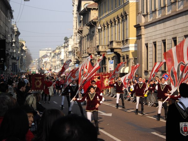 Corteo Storico Carnevale Ambrosiano 2009